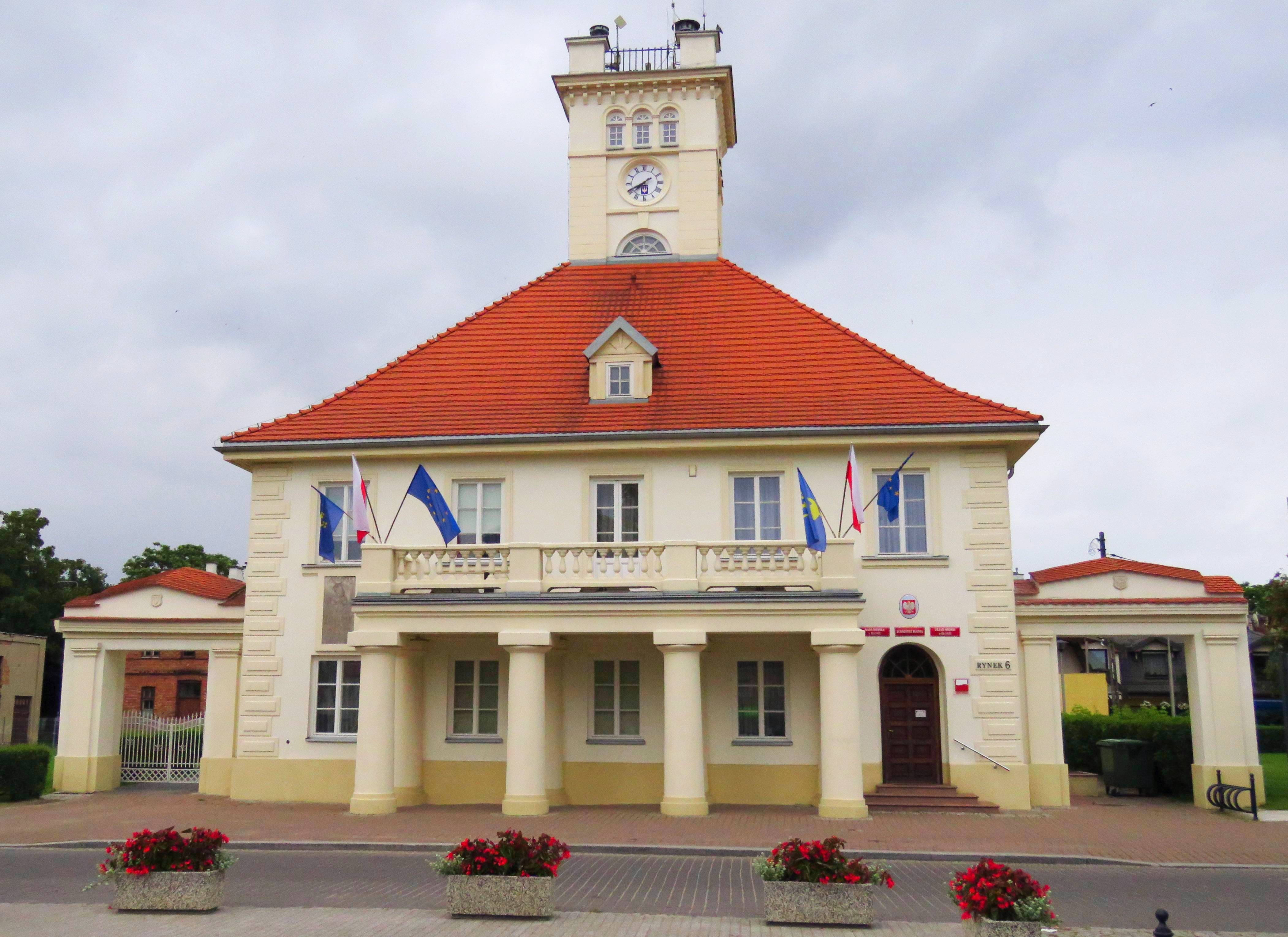 Urząd Miasta i Gminy w Błoniu